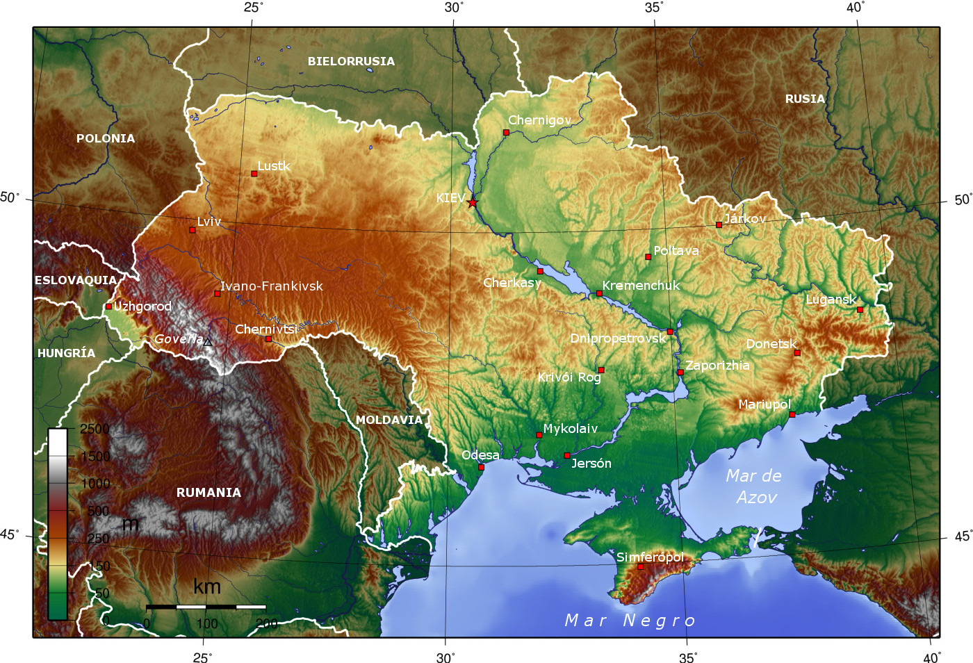 Mapa topográfico de Ucrania